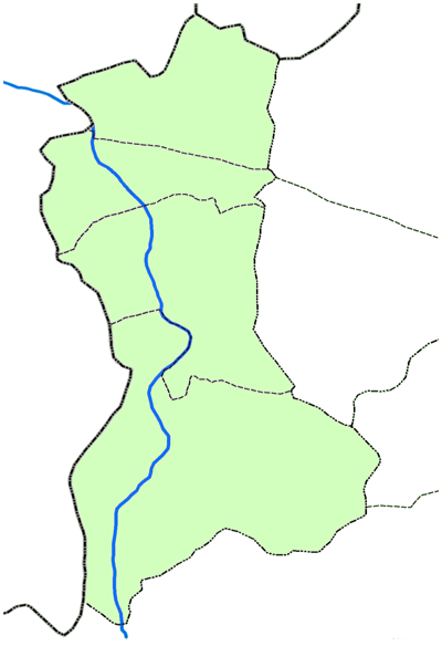 خارطة قضاء الشامية الصماء